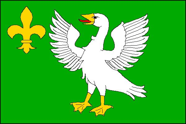 Česky: vlajka obce Loučany